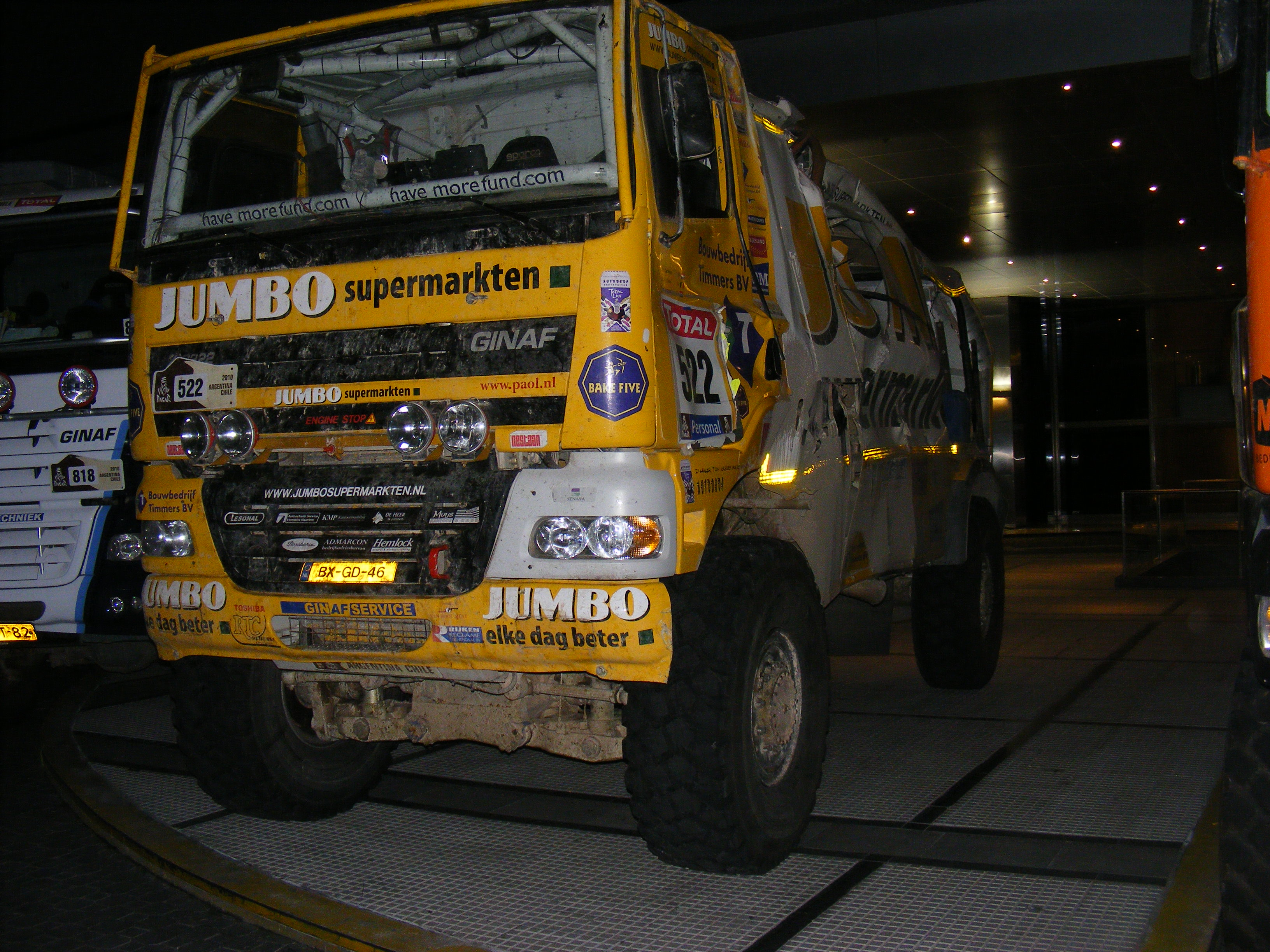 Beschädigter LKW nach der Rallye Dakar